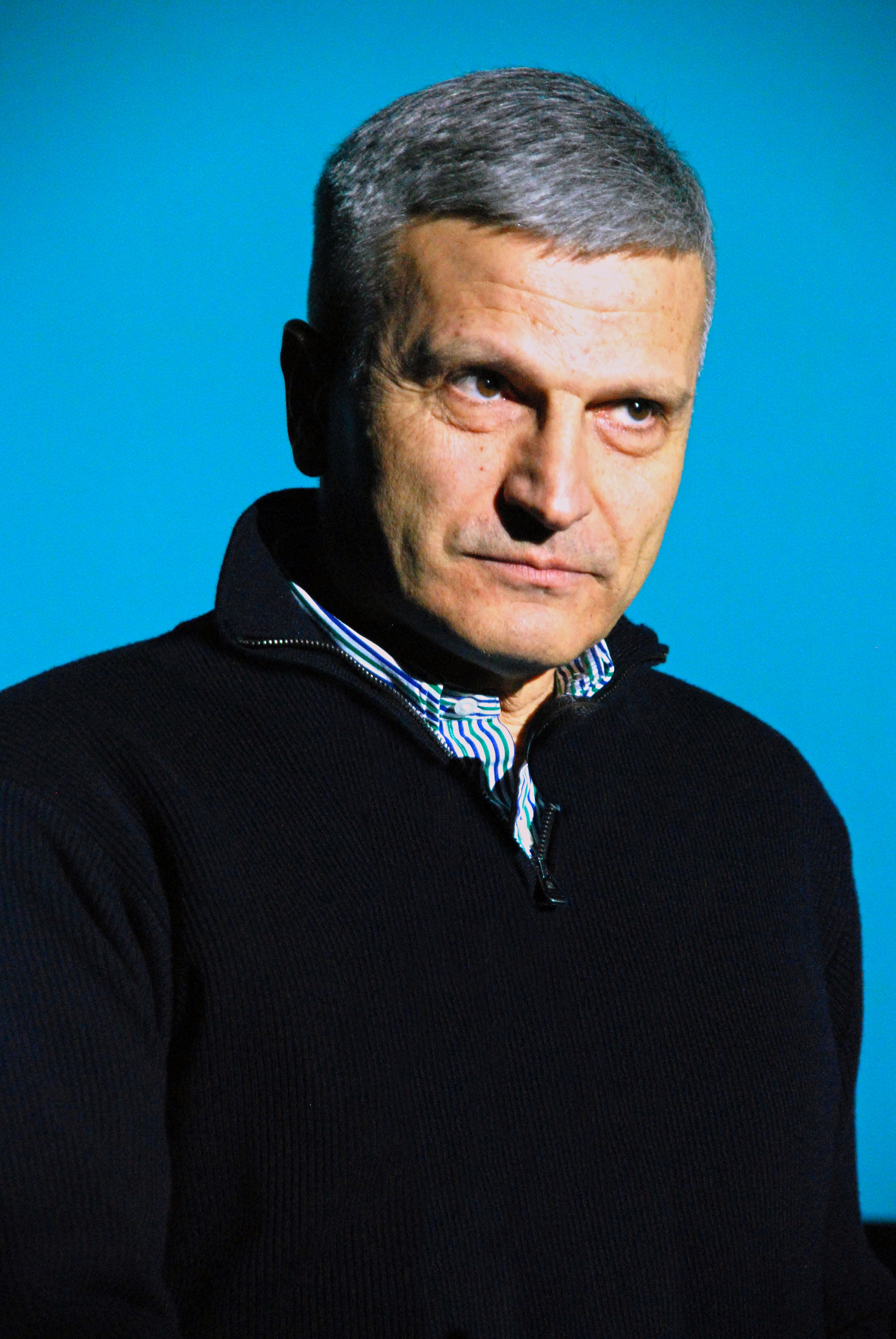 Небојша Брадић, српски редитељ